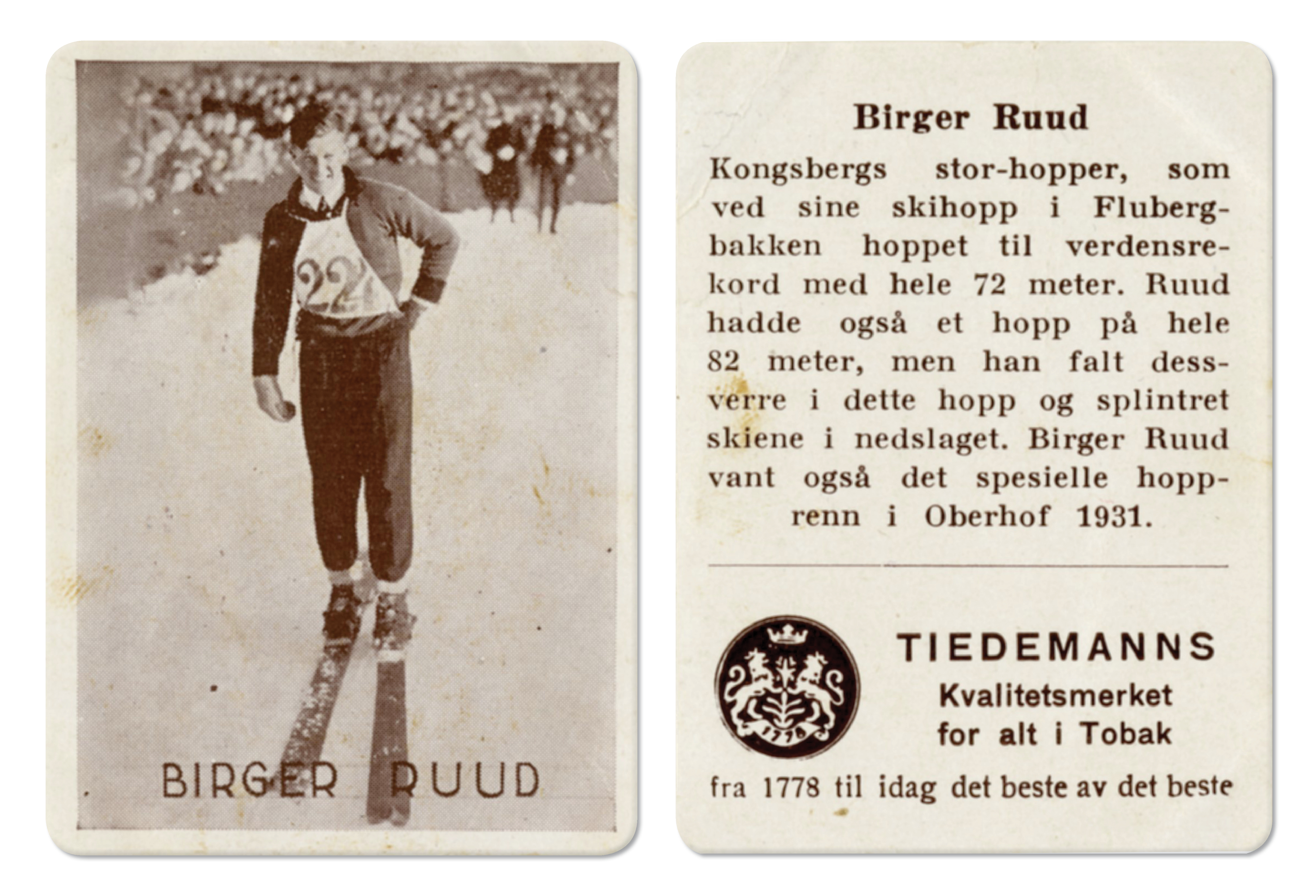 Format: Samlekort Dato / Date: ca. 1930 (dokumentet) Fotograf / Photographer: Ukjent Wikipedia: Birger Ruud (1911 - 1998) Eier / Owner Institution: Trondheim byarkiv, The Municipal Archives of Trondheim Arkivreferanse / Archive reference: Sportsklubben Freidig: Sigarettfoto ca. 1930 (Løpenr. 75) F23899 Tekst på baksiden: Birger Ruud Kongsbergs stor-hopper, som ved sine skihopp i Flubergbakken hoppet til verdenskord med hele 72 meter. Ruud hadde også et hopp på hele 82 meter, men han falt dessverre i dette hopp og splintret skiene i nedslaget. Birger Ruud vant også det spesielle hopprenn i Oberhof 1931. Merknad: Disse samlekortene med bilder av norske og internasjonale idretthelter fulgte med i sigarettpakker på 1920 og 30-tallet - derav tobakksreklamen på baksiden. Samlekortene kommer fra Sportsklubben Freidigs arkiv, og inneholder nærmere 90 unike kort pent plassert i et samlealbum. Samleren var den senere skipsmegler Finn Følling (1914 – 1985).